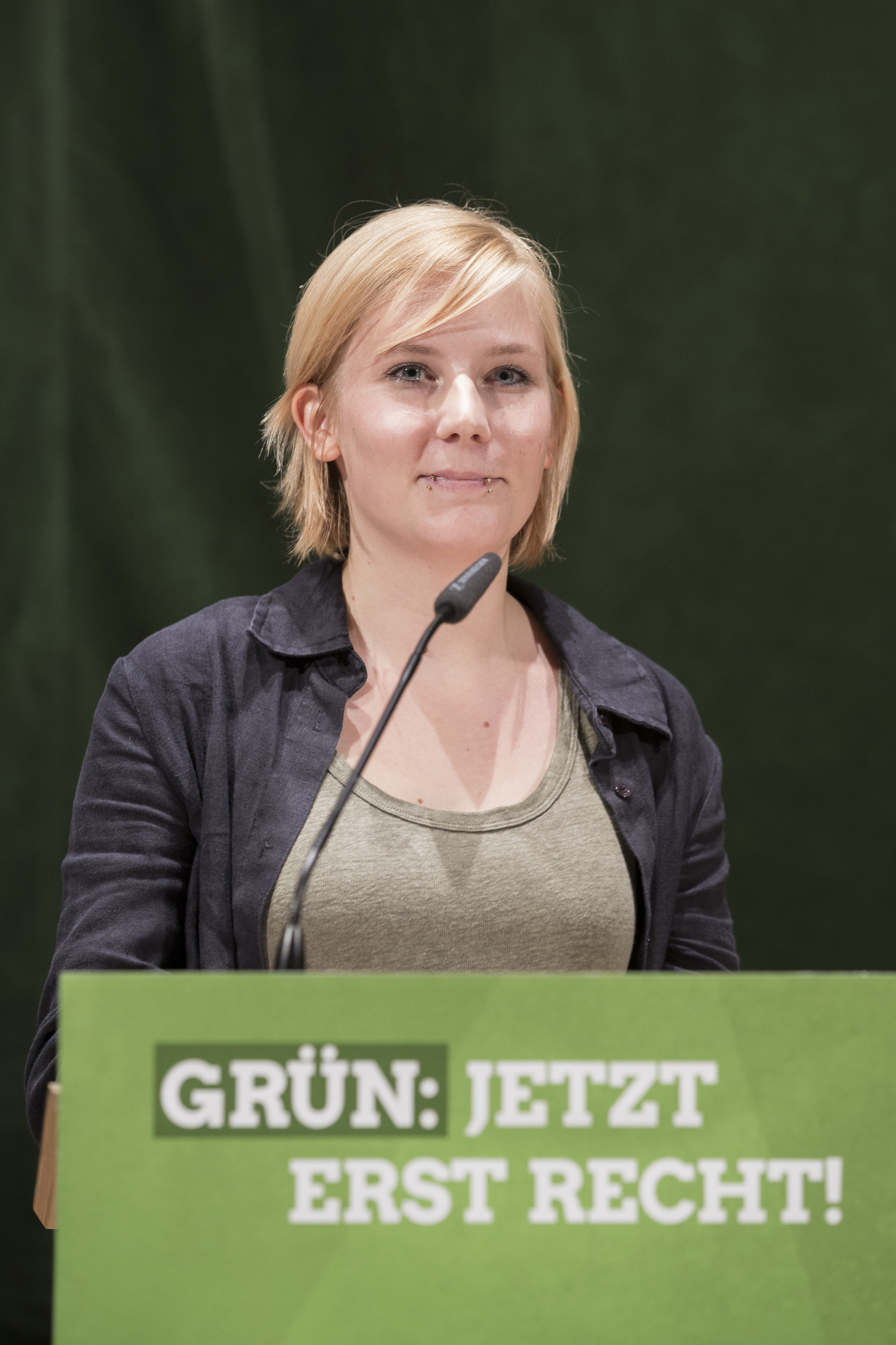 Imke Byl auf der Landesdelegiertenkonferenz von Bündnis '90/Die GRÜNEN Niedersachsen, 2017